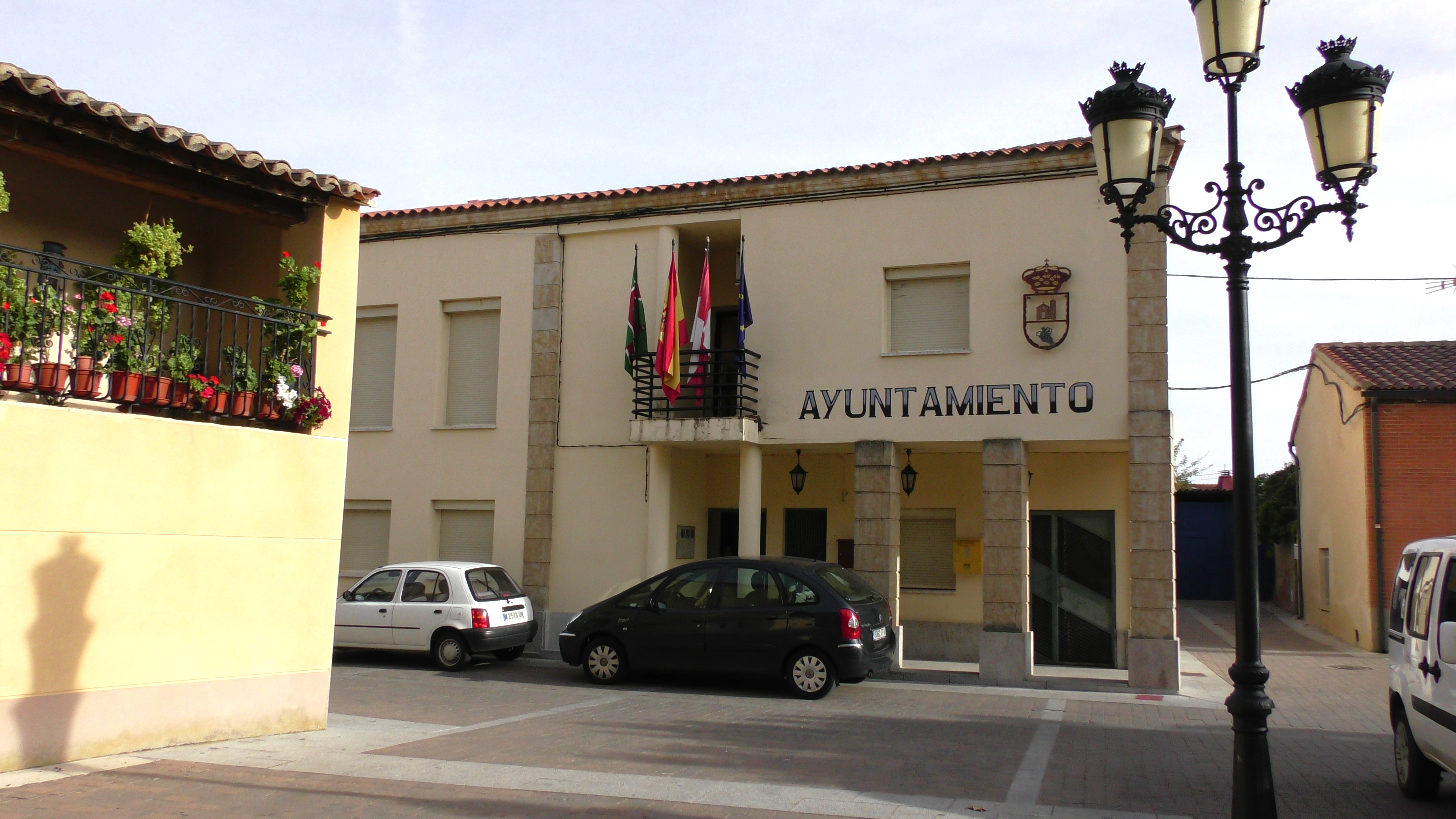 Arcenillas